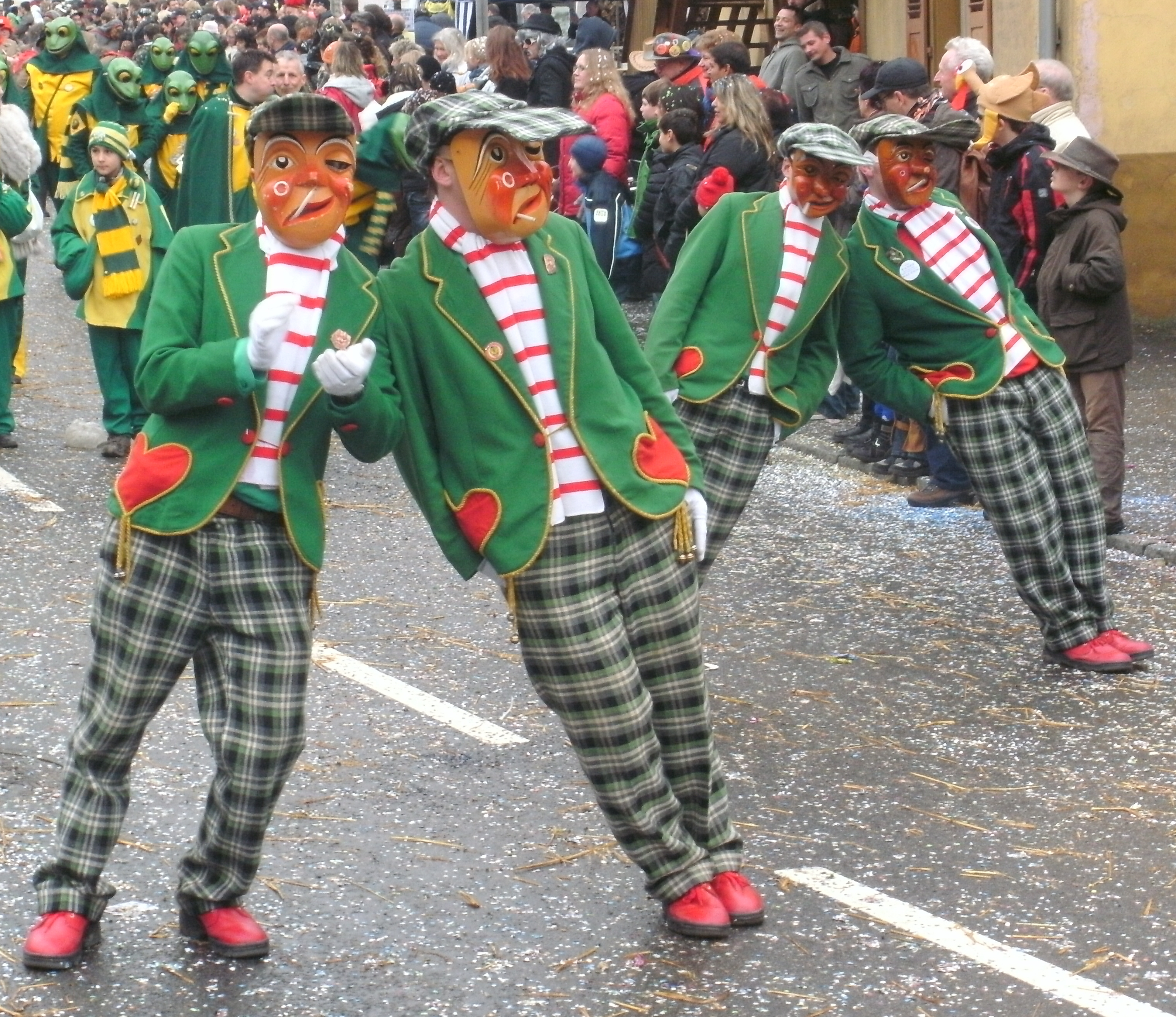 Mitglieder der „Latschari-Clique Rheinfelden e.V.“ aus Rheinfelden (Baden), beim Narrentreffen der „Vereinigung Hochrheinischer Narrenzünfte e.V.“ 2010 in Schwörstadt. Die 1937 vom einheimischen Künstler Arnold Schneider auf Anregung des damaligen, seit der NS-Machtübernahme amtierenden, Bürgermeisters Leopold Bösch entworfene Figur bezieht sich auf die arbeitslosen „Rumhänger“, von denen es während der Weltwirtschaftskrise ab Ende der 1920er Jahre in der noch sehr jungen Industriestadt viele gab. Das erst 1922 zur Stadt erhobene badische Rheinfelden hatte als solche keine gewachsene Fasnachtstradition, daher versuchte man gezielt, eine neue, zur Industriestadt passende Symbolfigur zu schaffen. Die Maske mit einer lachenden und einer weinenden Gesichtshälfte sowie (vom Aufenthalt im Freien oder vom Alkoholkonsum?) geröteten Wangen und Nase ist ein Symbol für die ambivalente Situation, in der sich die von Arbeitslosigkeit Betroffenen befanden: nicht arbeiten müssen einerseits, nicht den eigenen Lebensunterhalt verdienen können andererseits (Quelle: Wir über uns, Website der Latschari-Clique Rheinfelden) Anmerkungen: Der Umstand, dass in der Zeit des Nationalsozialismus bis zum Kriegsbeginn die Fasnachtsaktivitäten geradezu einen Aufschwung nahmen, ist nicht auf Rheinfelden oder die Region begrenzt (vgl. z.B.: Carl Dietmar, Marcus Leifeld: Alaaf und Heil Hitler: Karneval im Dritten Reich. Herbig Verlag, München 2010. ISBN 978-3-7766-2630-8).